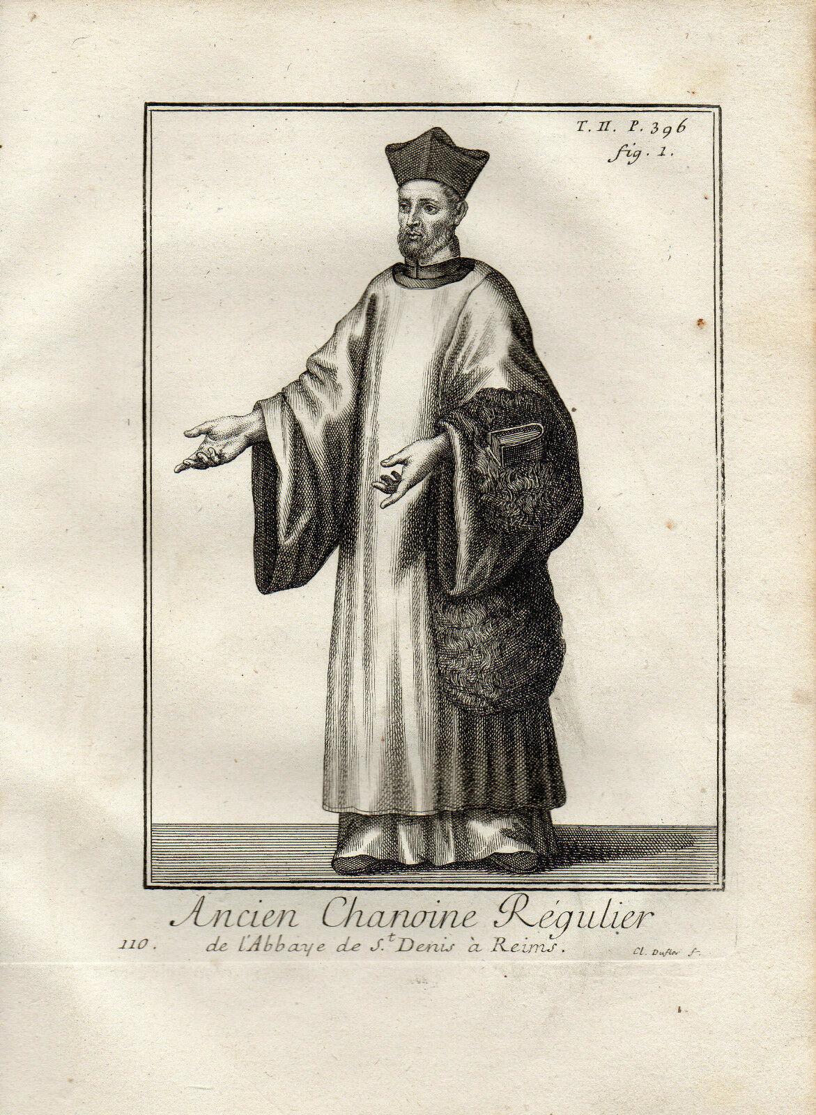 Gravure : chanoine régulier de l'abbaye Saint-Denis de Reims.